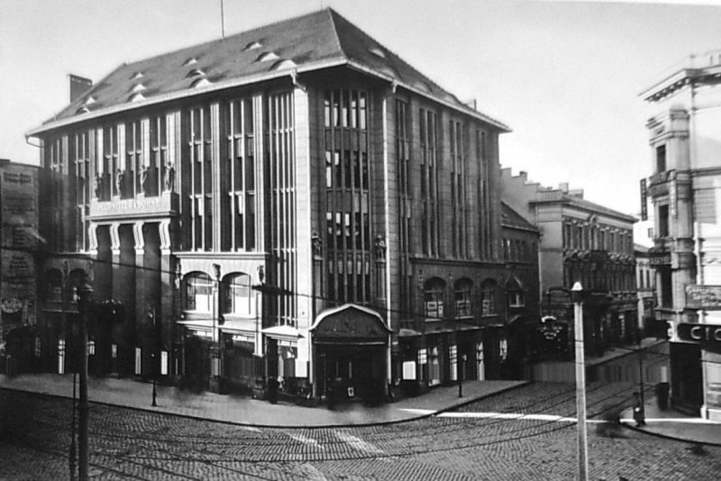 Dom Handlowy Conitzer&Sohne w Bydgoszczy